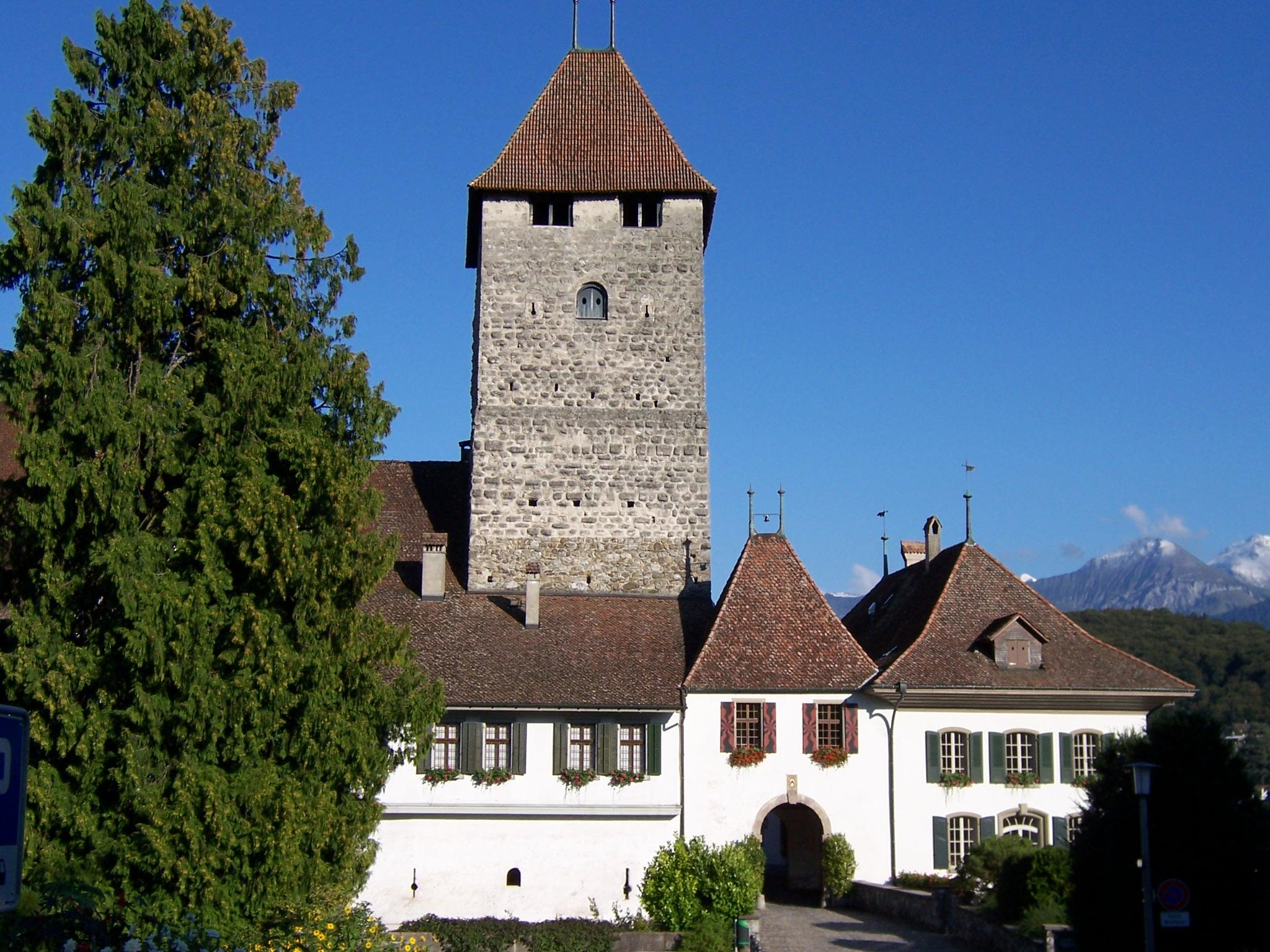 Schloss von Spiez am Thunersee (Kanton Bern, Schweiz) eigene Aufnahme vom 31. August 2006